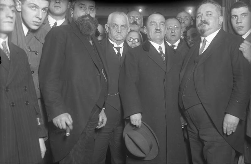 Professor Hellpach spricht nicht in Frankreich! Prof. Hellpach, welcher dem deutsch-französischen Studien-Comite in einem Brief ankündigte, dass er seine Zusage eines Vortrages im Rahmen des germanistischen Institut der Sorbone nicht aufrecht erhalten könne, weil dem deutschen Komponisten Weingärtner es nicht gestattet wurde, in Frankreich zu konzertieren.